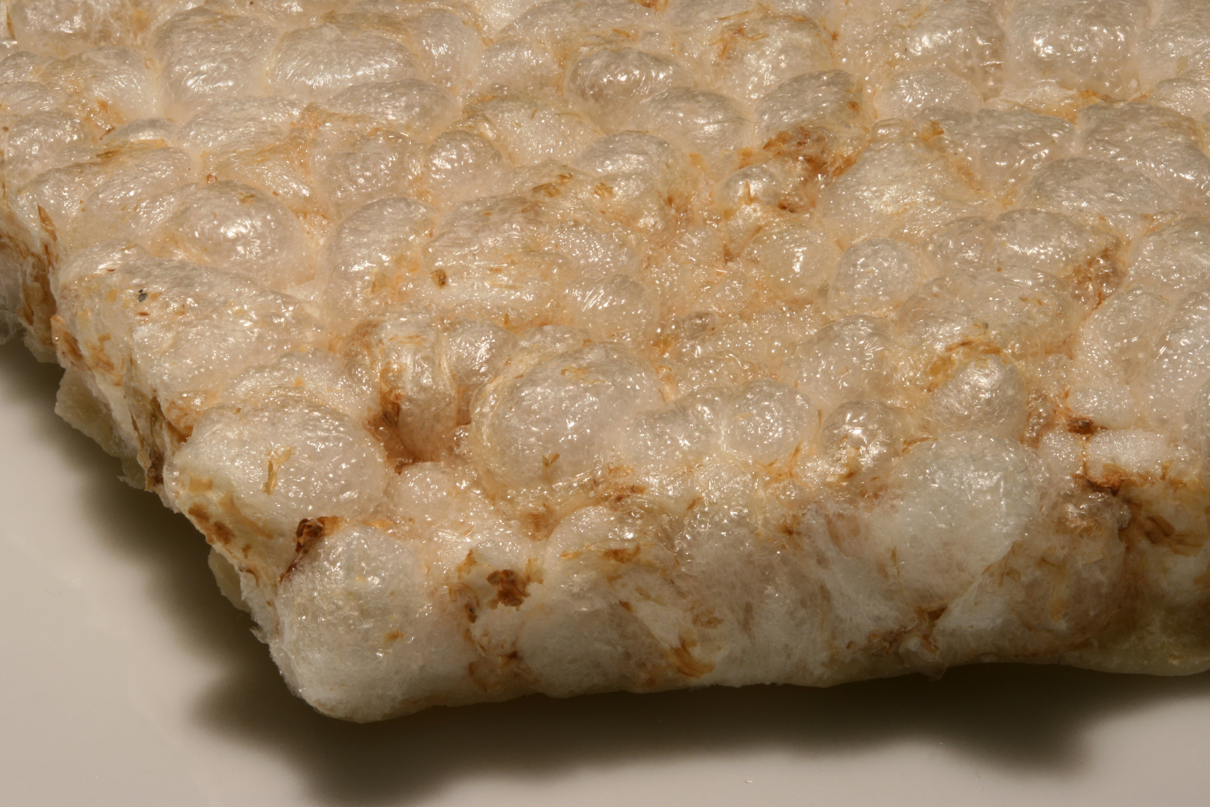 Reiswaffel